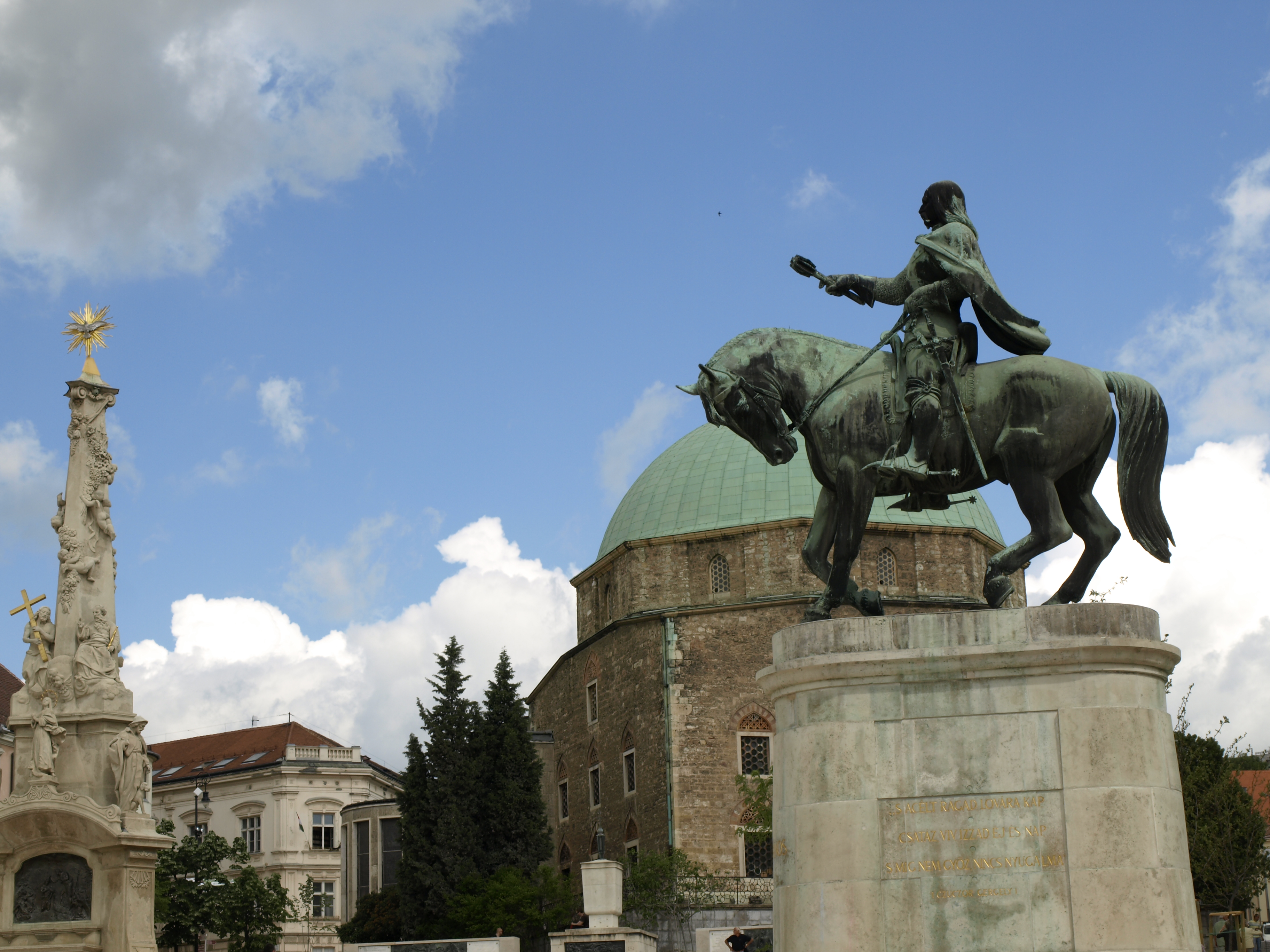 Széchenyi tér